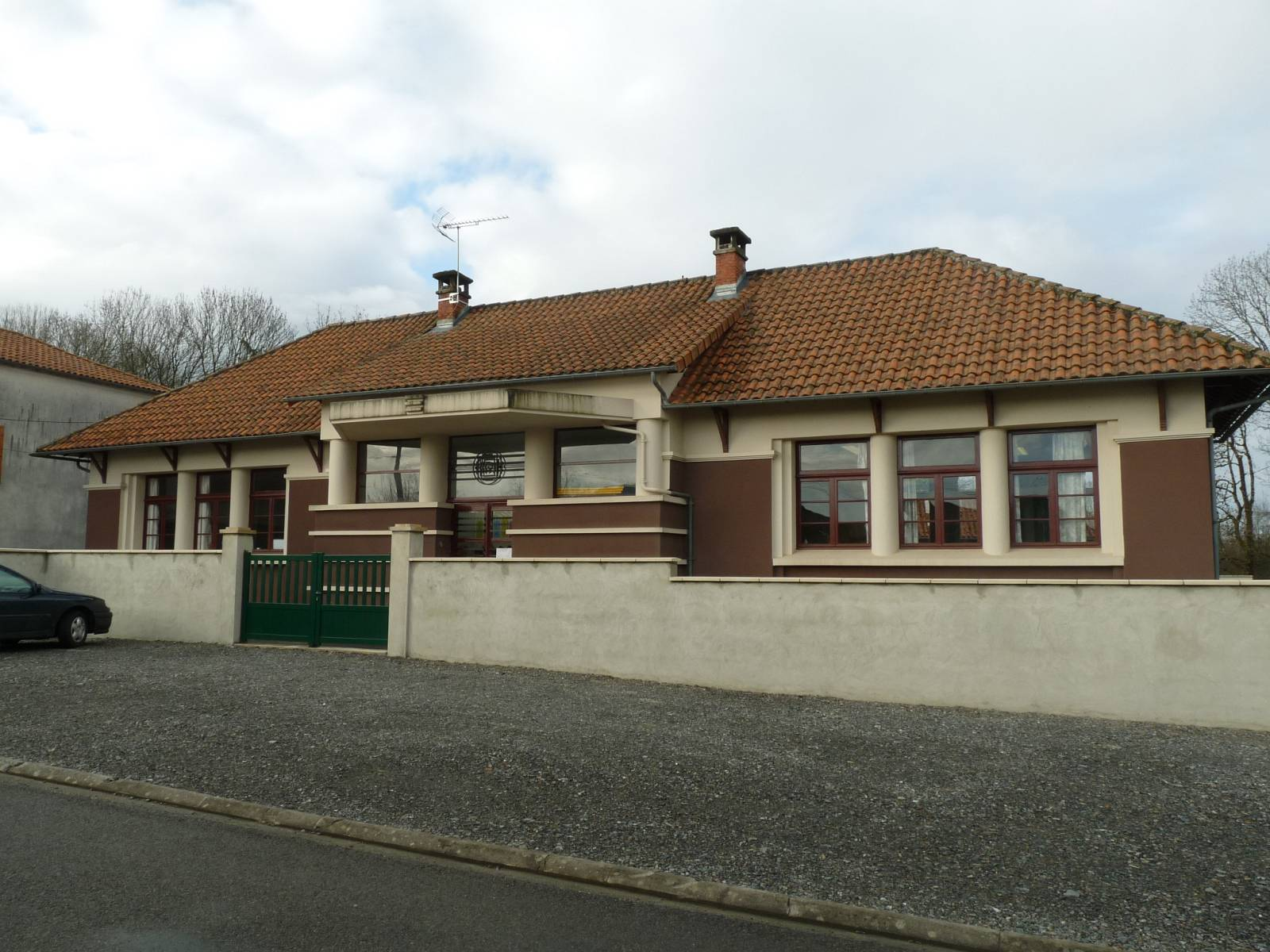 école du Lindois, Charente, France